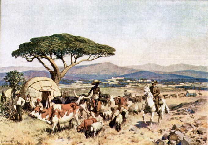 Windhuk